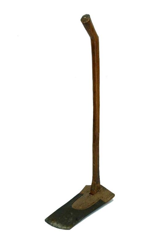 Hak. Hak met lange steel, voor de bewerking van landbouwgrond waar men met de ploeg niet kan komen.. Metalen hak met houten steel Unknown language: Pacul ; (voorheen patjol)